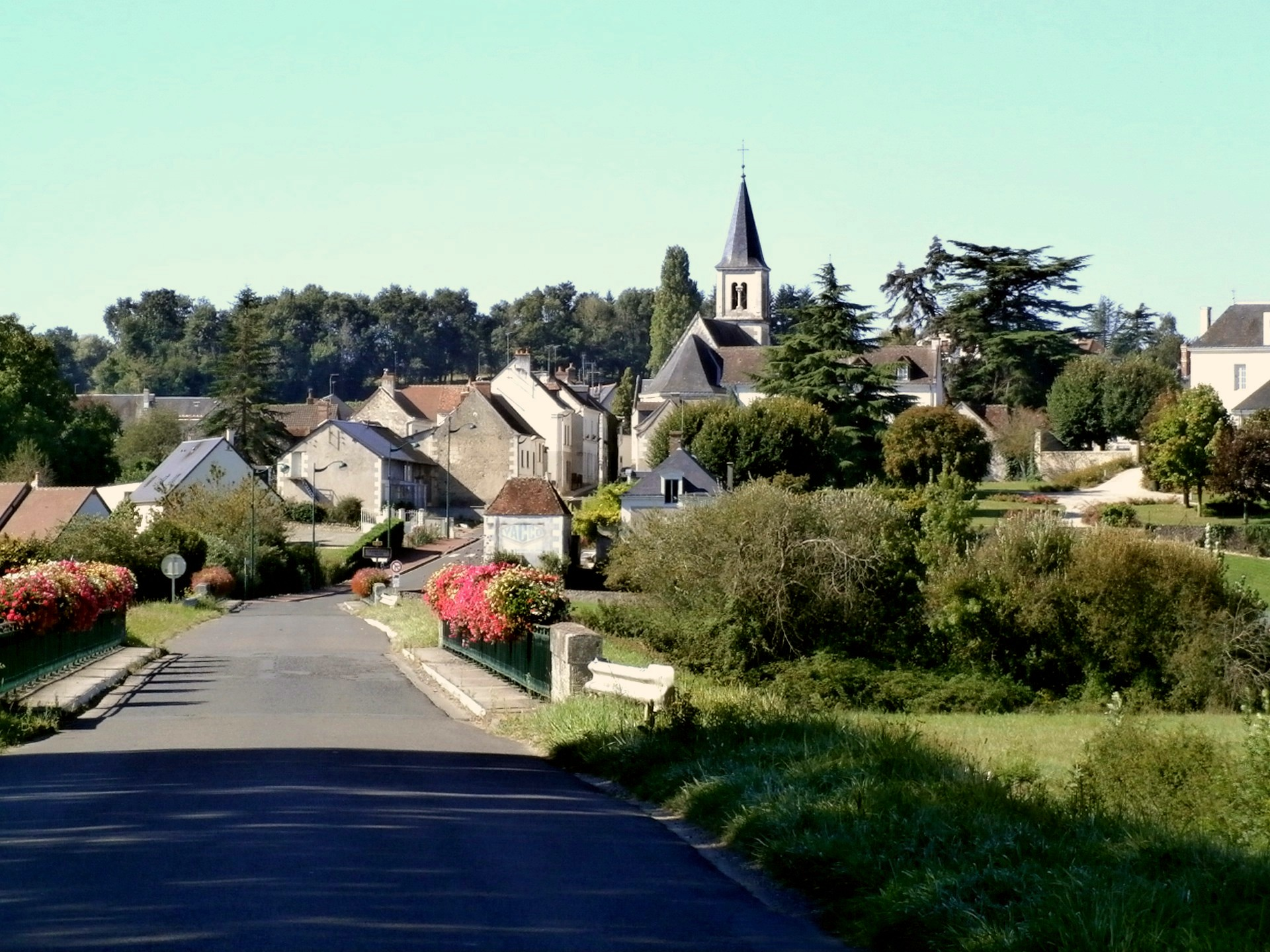 vue générale du village de Chambourg-sur-Indre (France)